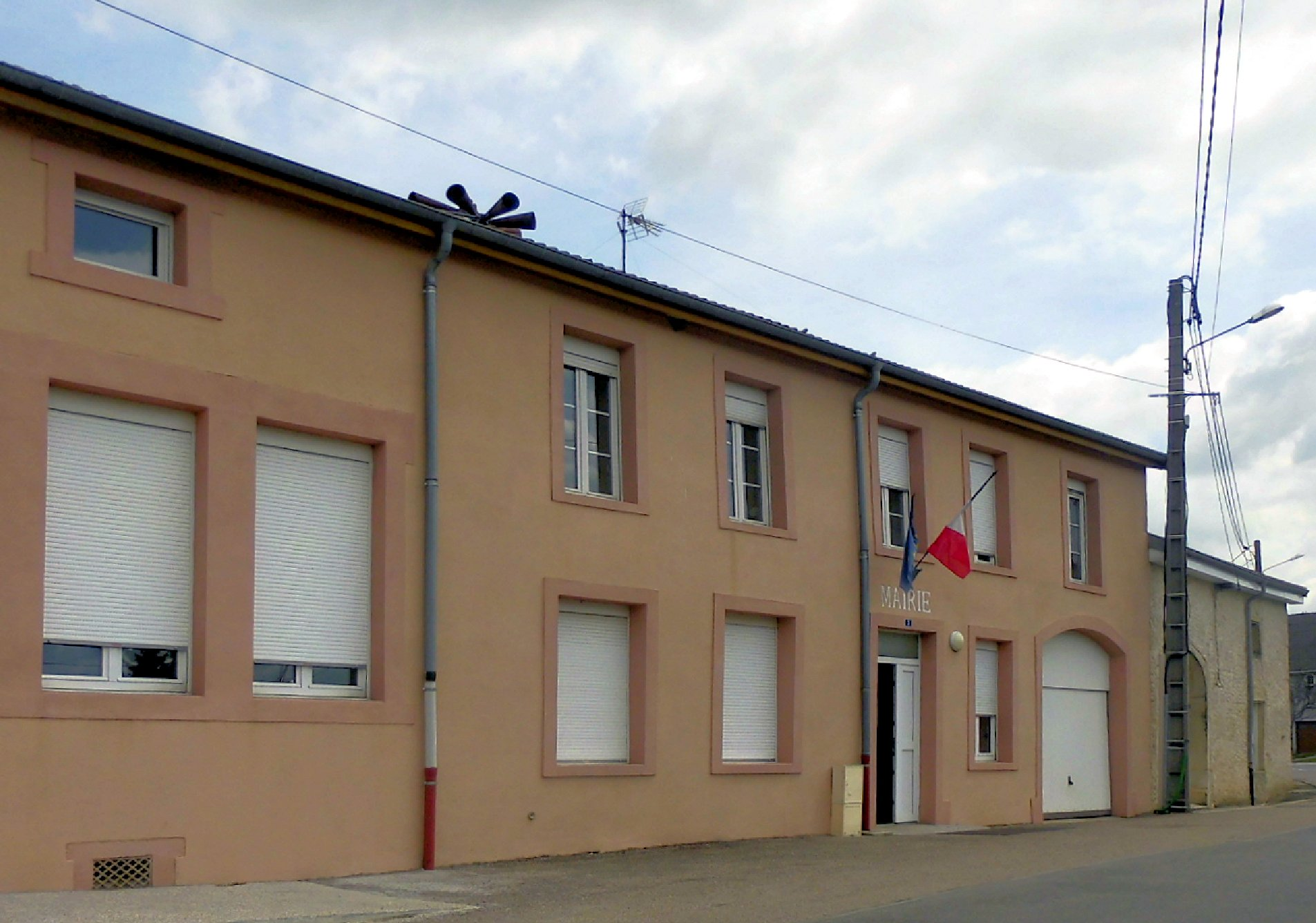 La mairie d'Auzainvilliers